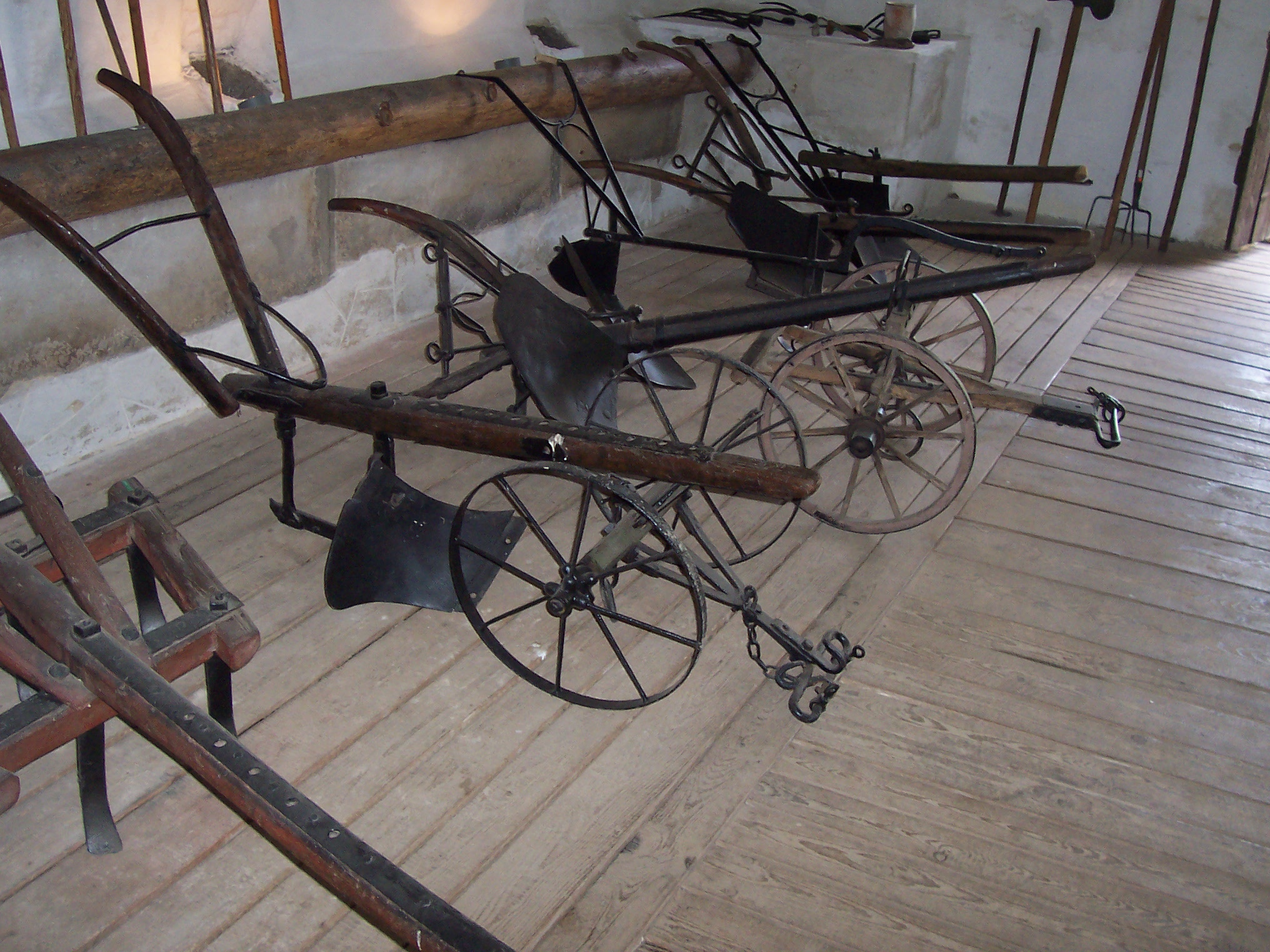 Dlaskův statek v Dolánkách u Turnova - pluhy / ploughs